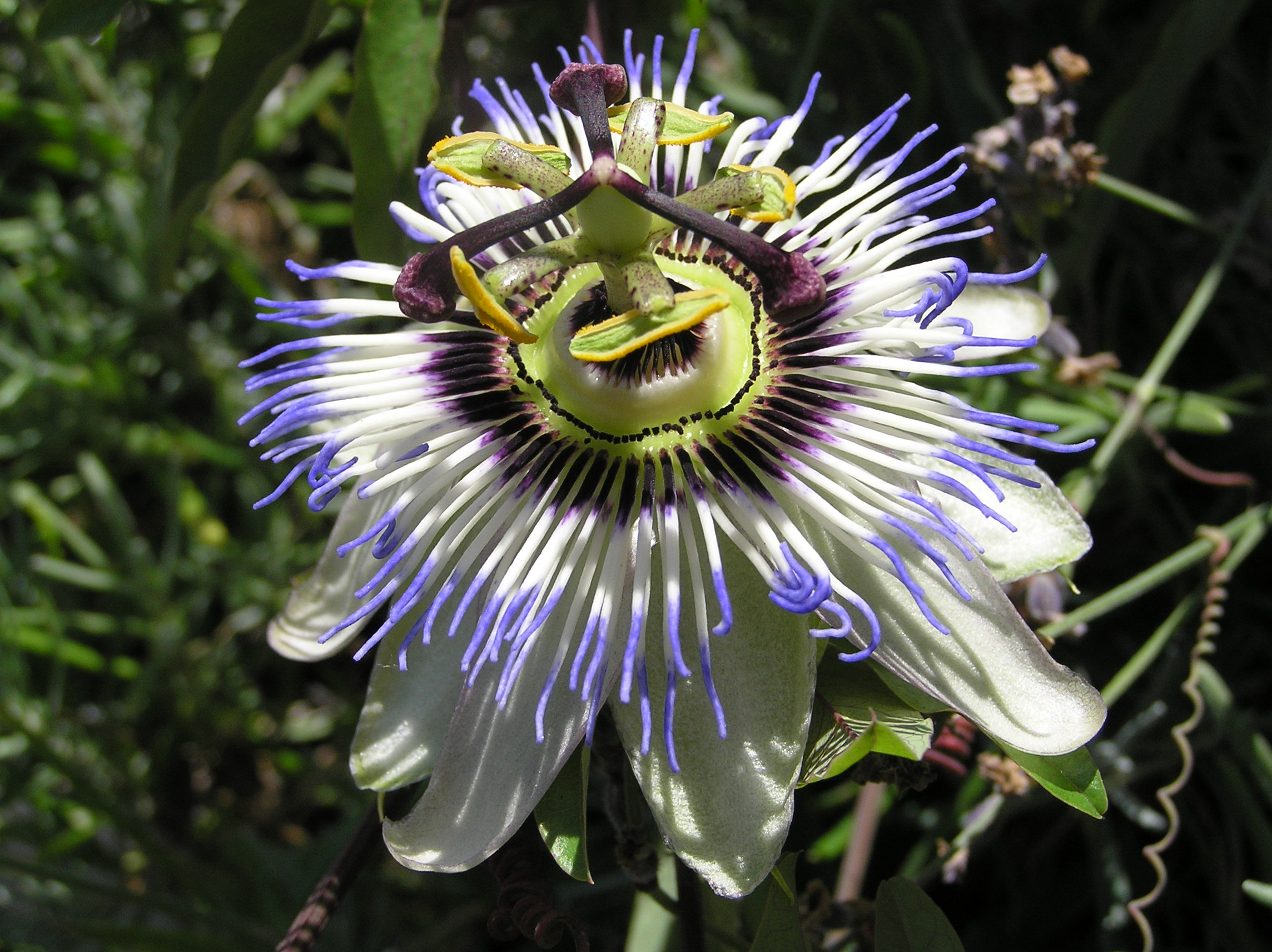 Passiebloem gefotografeerd met macro. Zwolle, Overijssel, Nederland